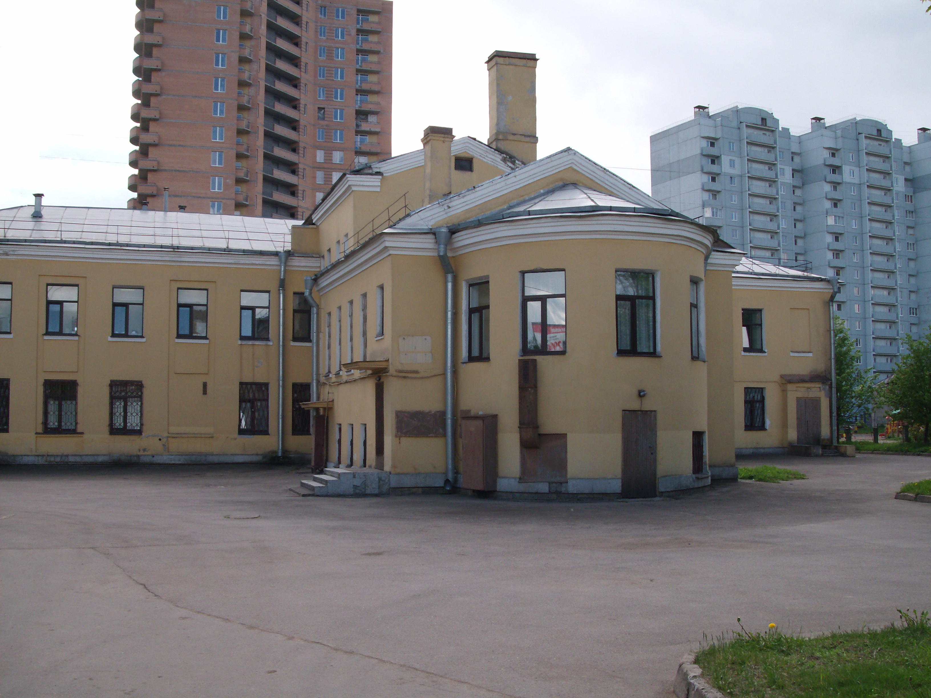 Детская стоматологическая поликлиника на Брюсовской улице